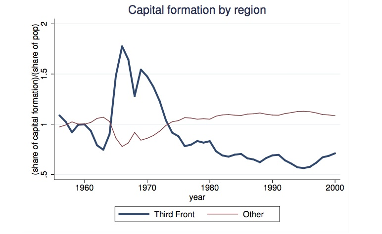 三线假设时期分地区投资强度（人均投资额，相对于全国平均）